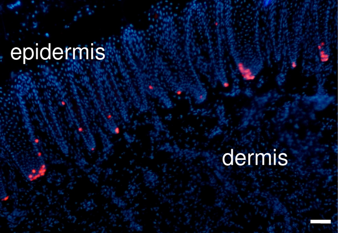 Figura 1. Las células de Merkel MC están densamente representados en el hocico porcino. Las MC marcadas con inmunotinción CK20 (en rojo) parecen abundantes en la capa basal de la epidermis del hocico porcino. Por el contrario, se encontraron menos de 50 MC/mm2 en la piel glabra humana. Los núcleos se tiñeron de azul con DAPI. Barra de escala, 50 µm.